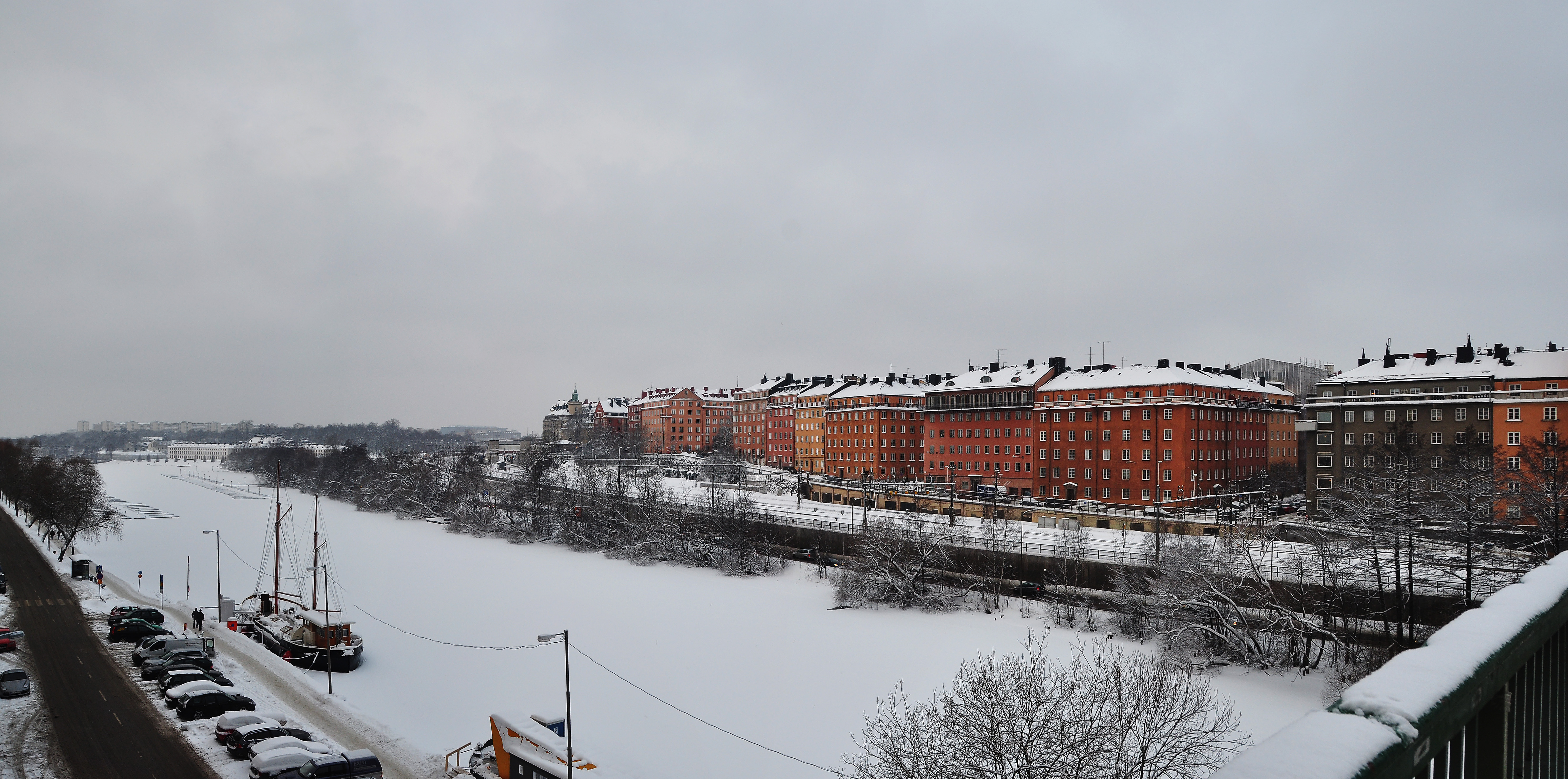 Norrbackagatan ovanför Barnhusviken, sedd från Sankt Eriksbron